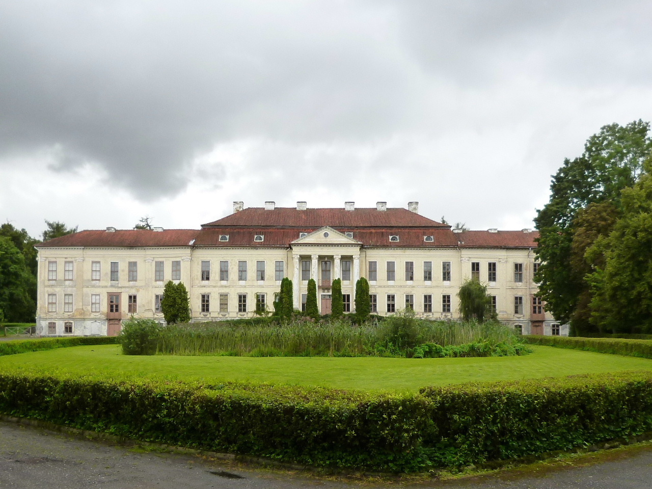 Barockschloss Dönhoffstädt - Drogosze (deutsch Dönhoffstädt)